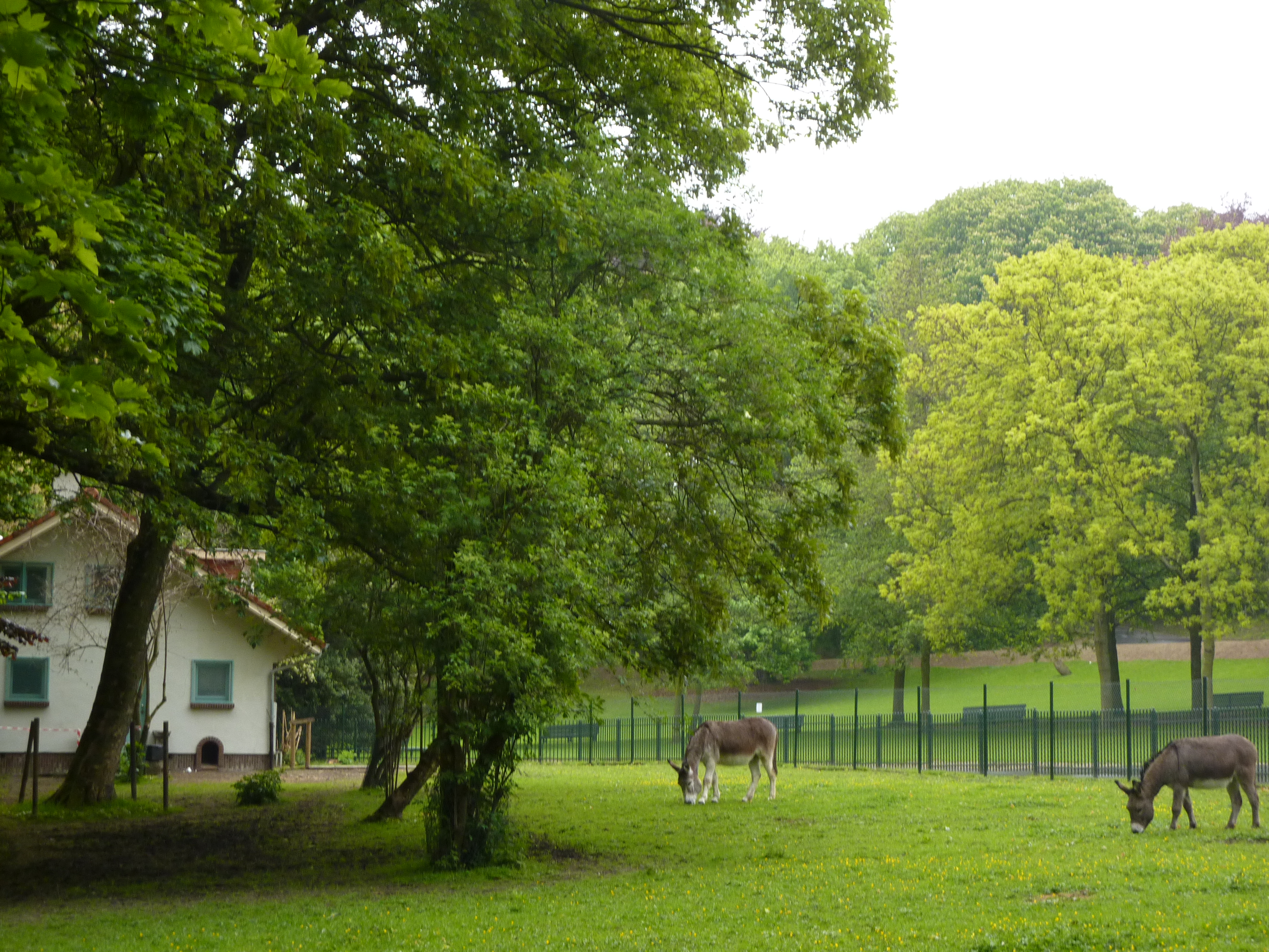 Parc Josaphat : Camille et Gribouille, les ânes mascottes de Schaerbeek